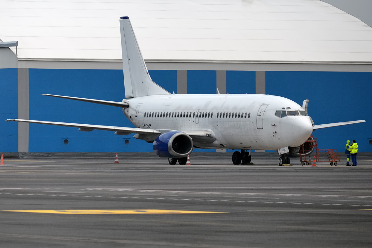 Small Planet Airlines, LY-FLH, Boeing 737-382